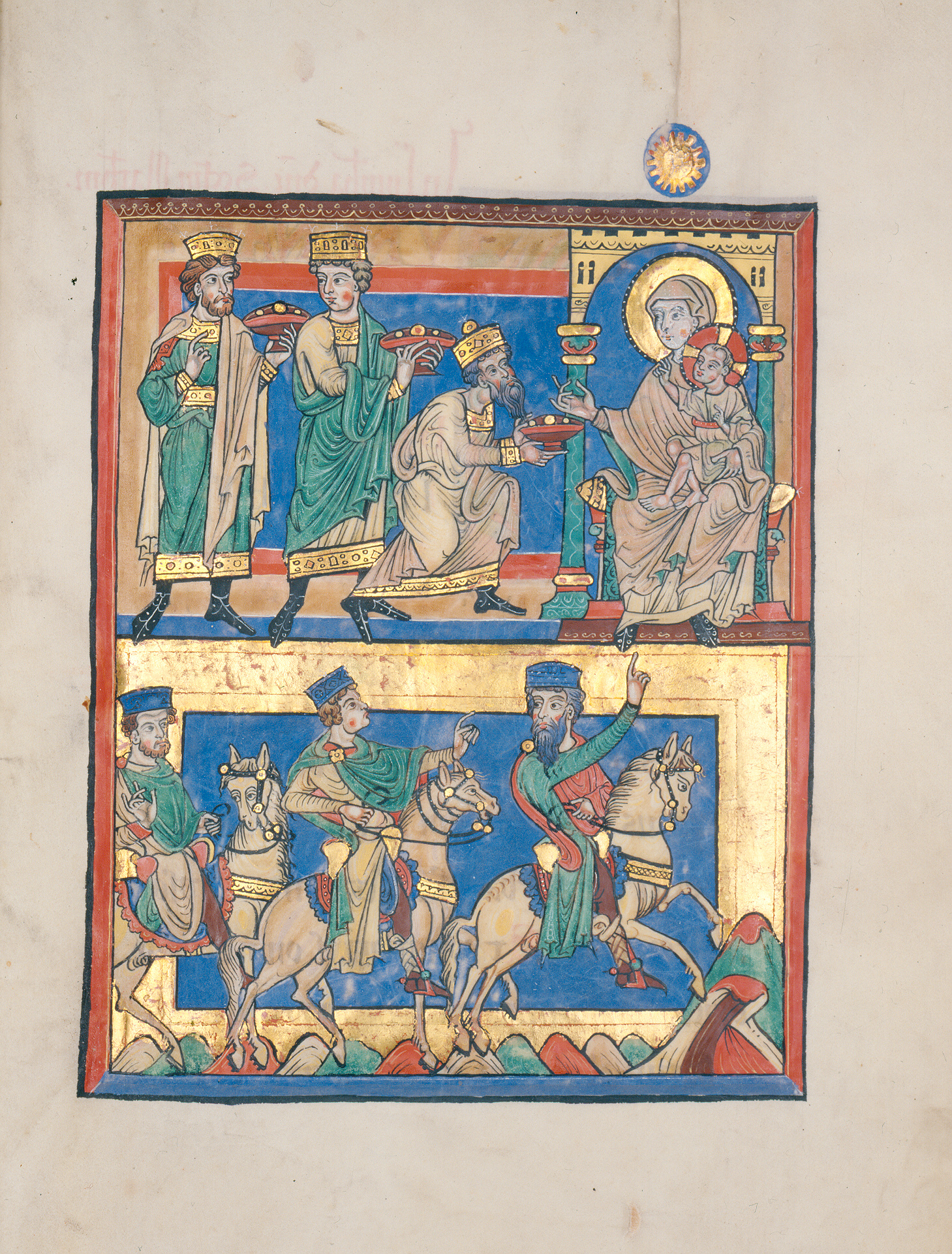 Evangelistar von Speyer, um 1220 Manuscript in the Badische Landesbibliothek, Karlsruhe, Germany Cod. Bruchsal 1, Bl. 11r